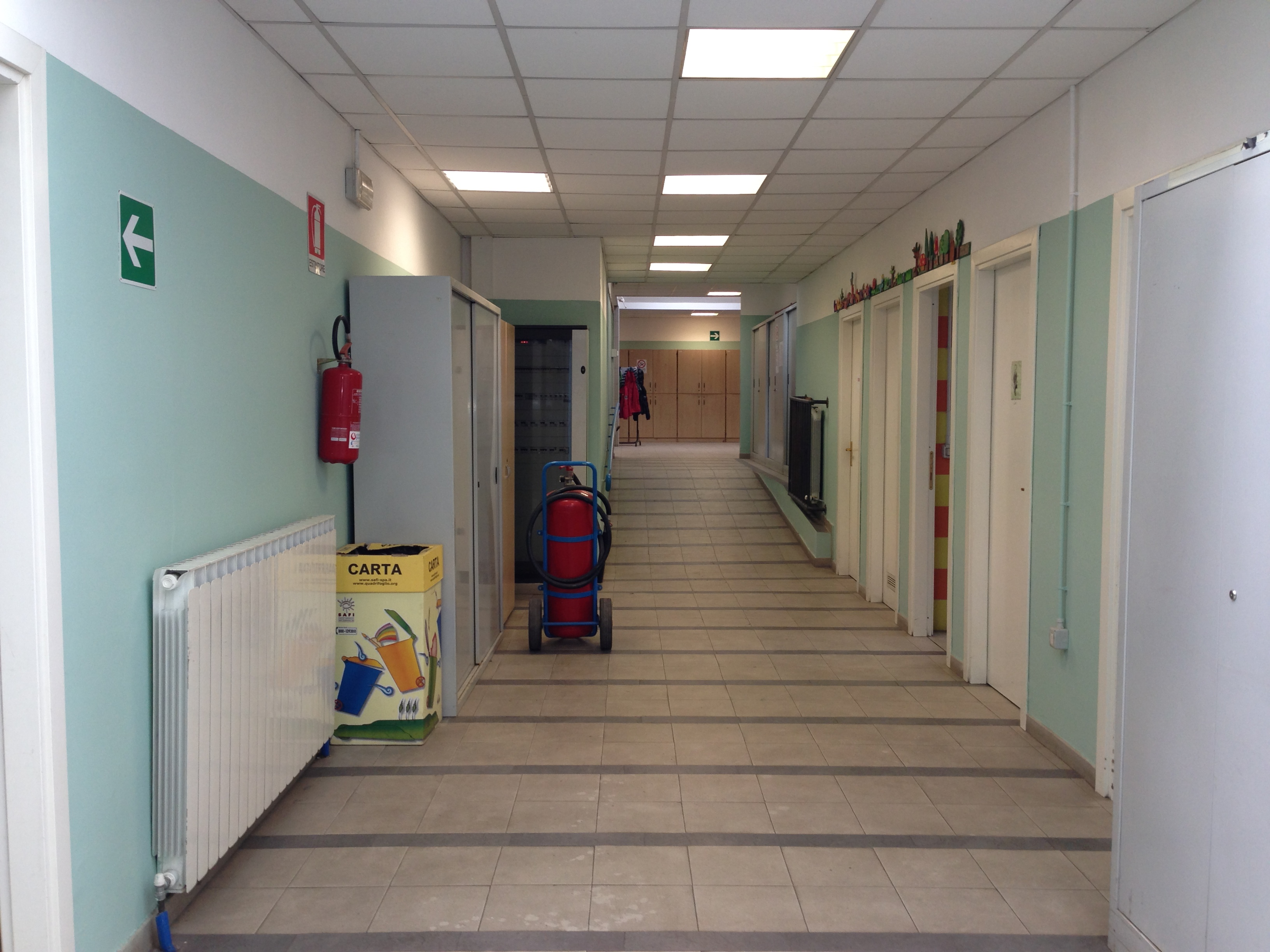 Scuola Città Pestalozzi Firenze.